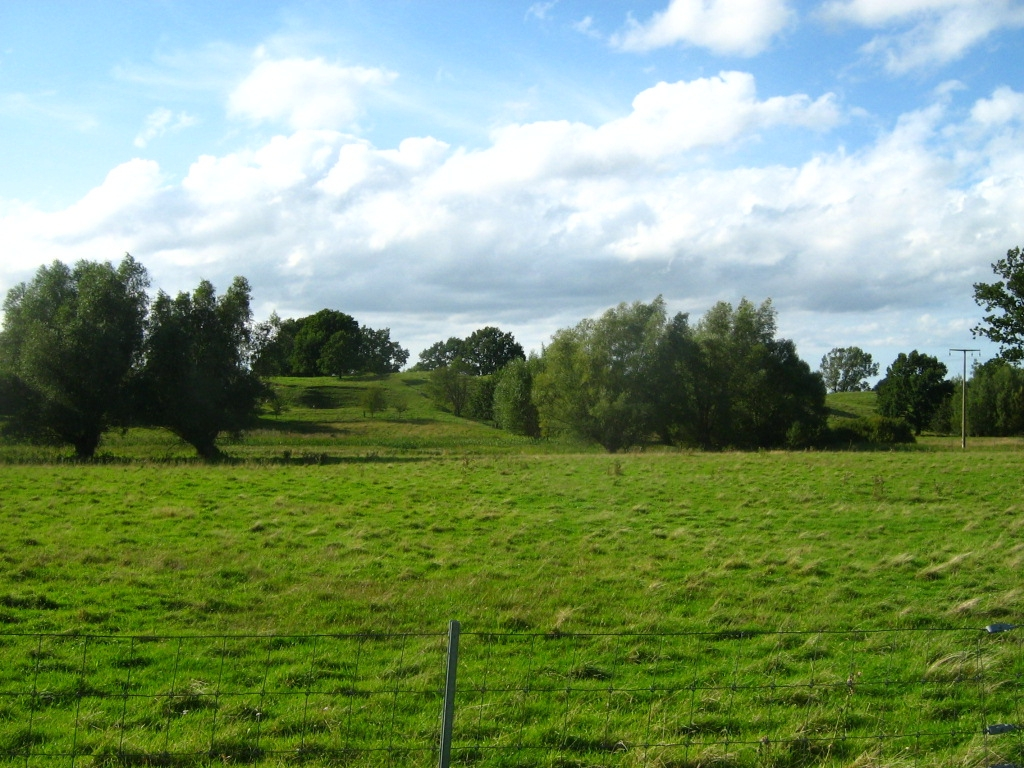 Oser (singl. Os), Esker oder Wallberge sind bahndammförmige Sedimentationen von Gesteinsmaterial in Gletscherspalten oder -tunneln, meist in der Grundmoränenlandschaft gelegen. Das hier abgebildete Os verläuft in Nordnordost-Südsüdwest-Richtung von Gatschow im Norden bis Zettemin im Süden im Landkreis Demmin in Vorpommern und ist das längste, mehr oder weniger zusammenhängende Os Nordostdeutschlands. Es verläuft parallel zur glazialen Rinne, bzw. an deren oberem Westrand, die heute das Stromtal des Augrabens bildet